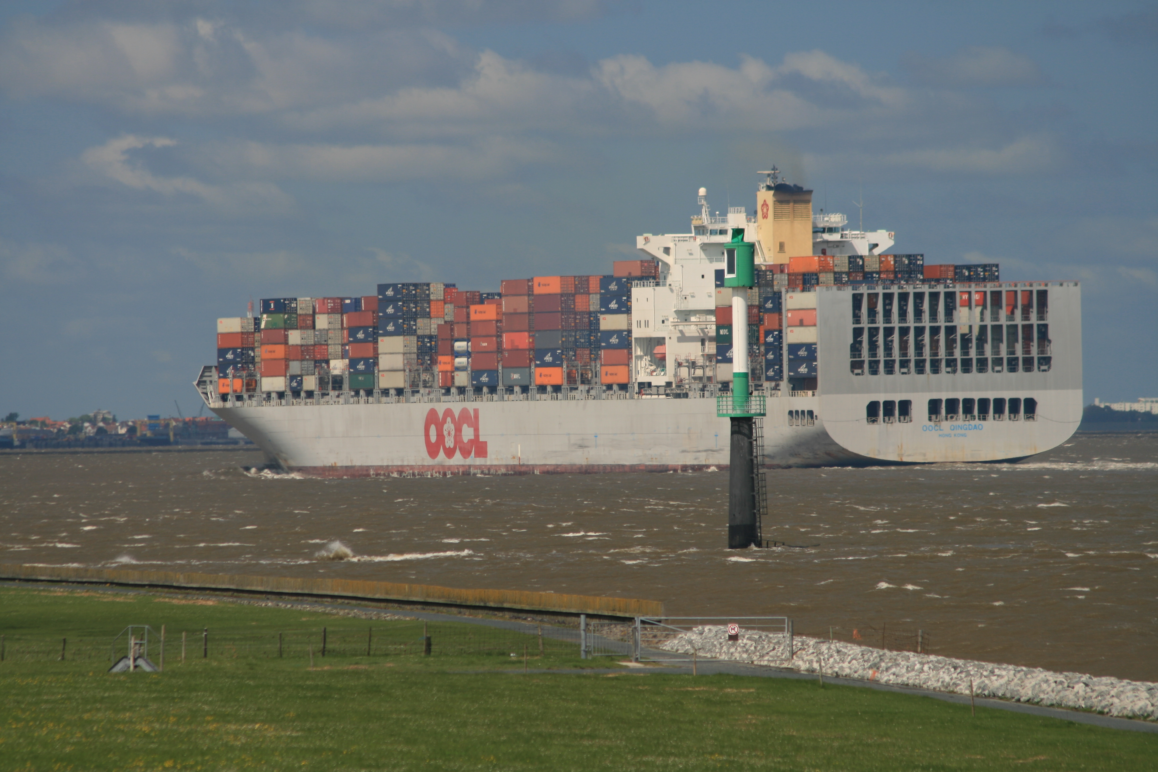 OOCL Qingdao 8.063 TEU tideunabhängig vor Glameyer Stack am 17. Mai 2007 IMO Number: 9256470 MMSI Number: 477292000 Callsign: VRZL2 Length: 323 m Beam: 43 m